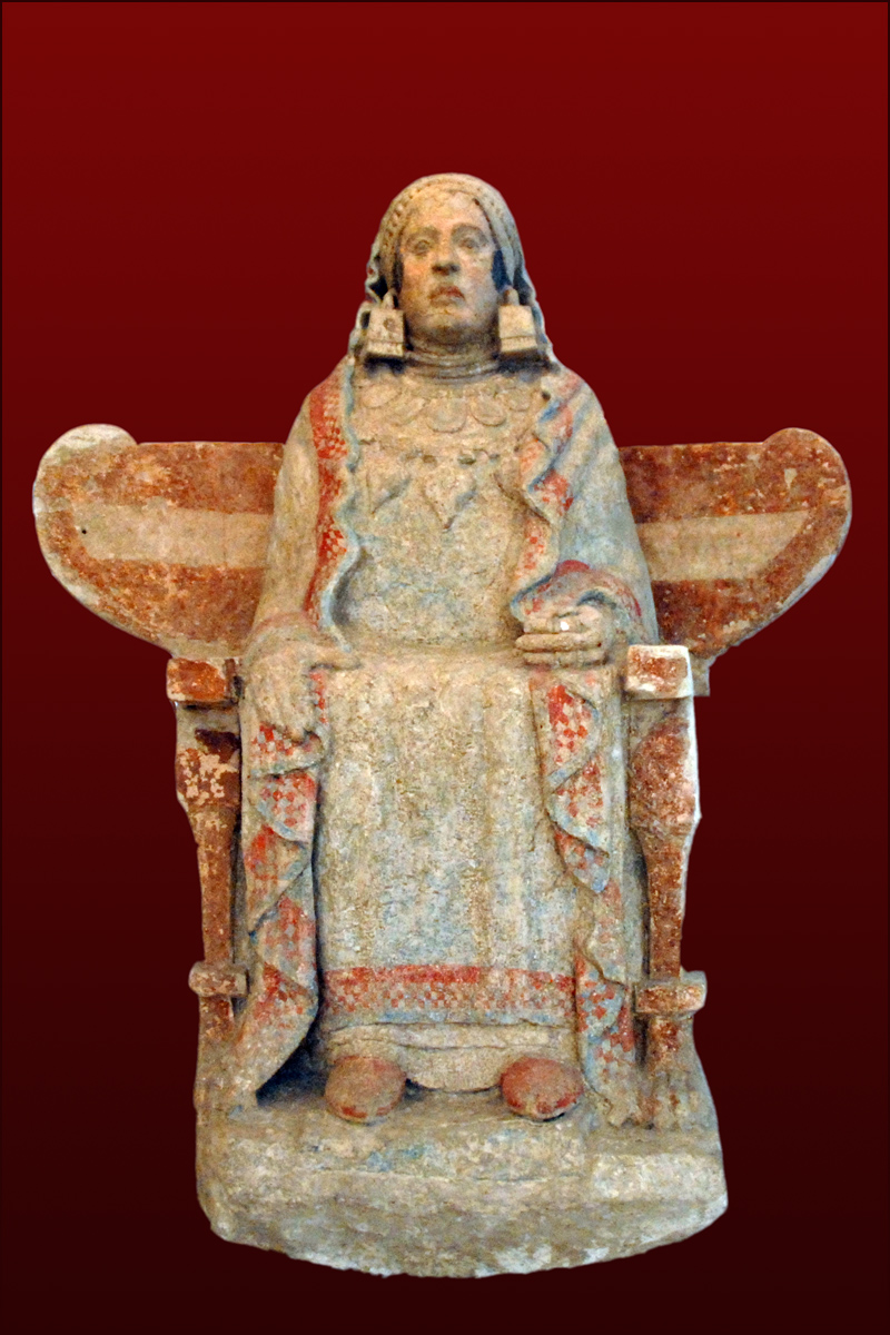 Iberian sculpture.